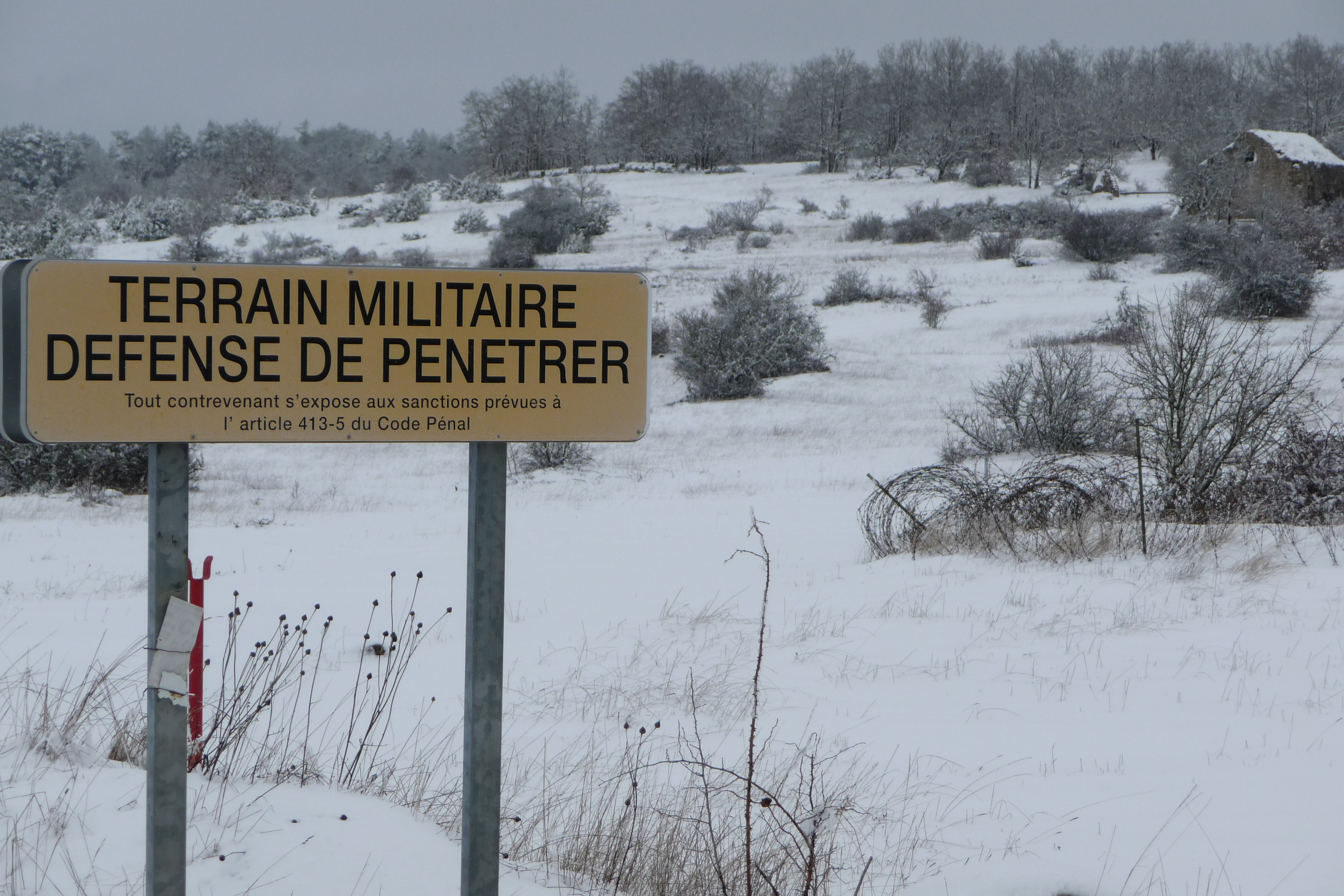 Frontière camp militaire Larzac 2013